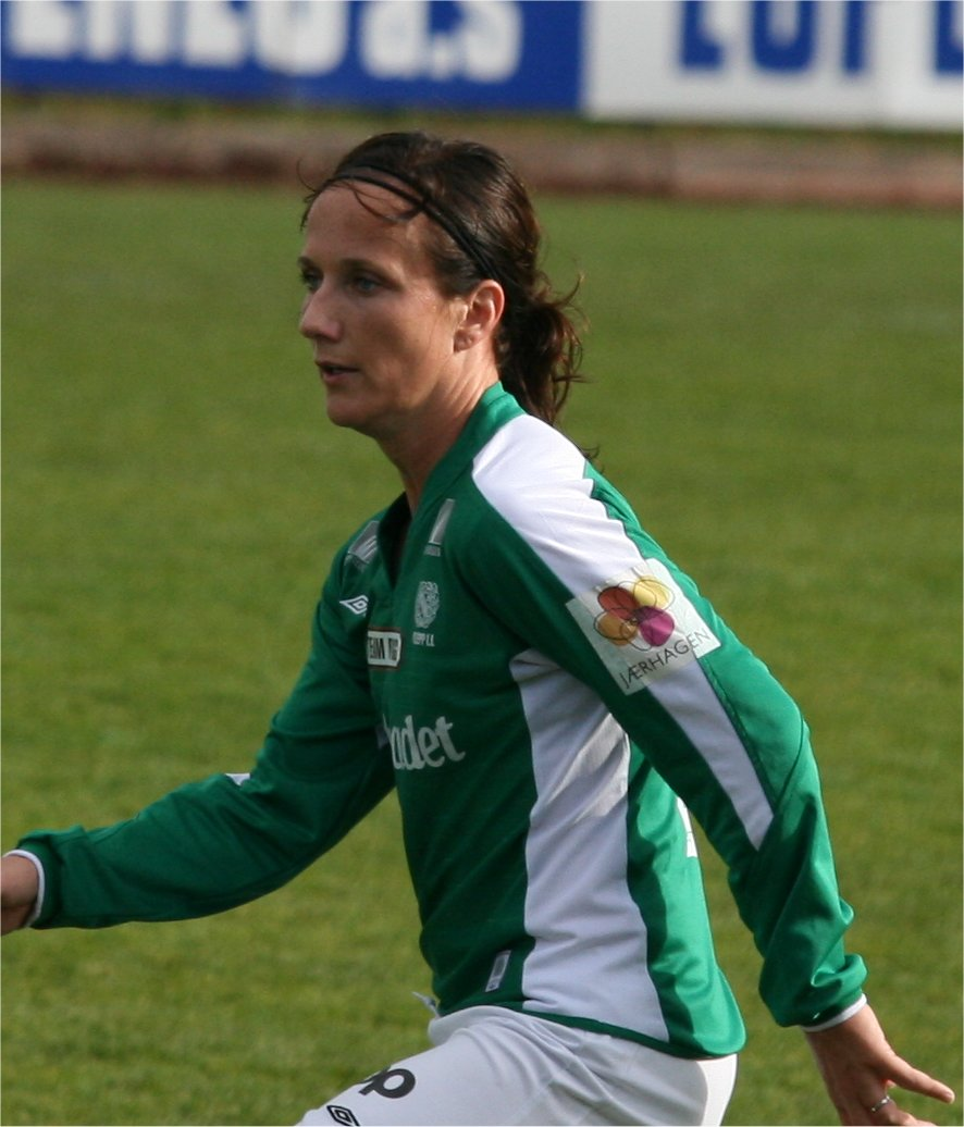 Ane Stangeland Horpestad, Klepp IL